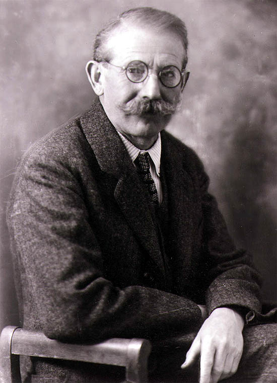 Portrét fotografa Josefa Seidela